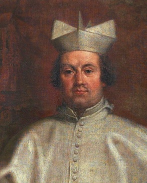 Abt Teniers